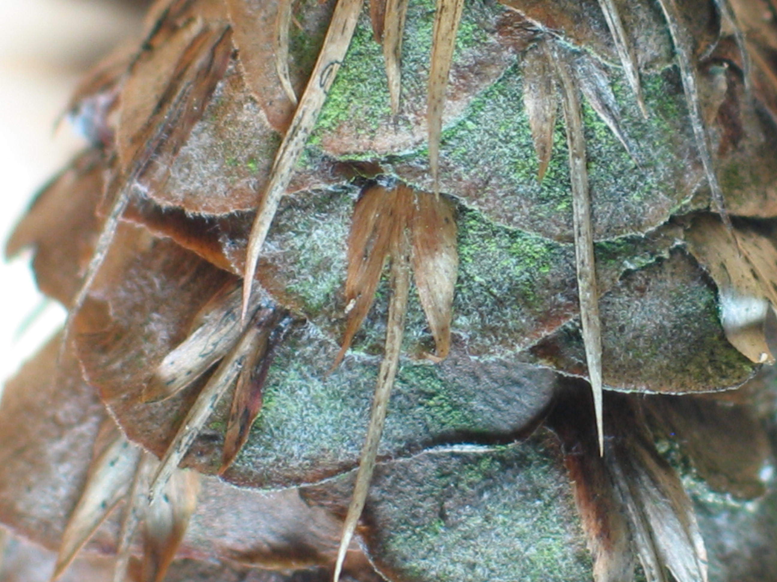 Ausschnitt aus einem Douglasienzapfen. Man sieht die schmalen, spitzen Deckschuppen zwischen den Samenschuppen.